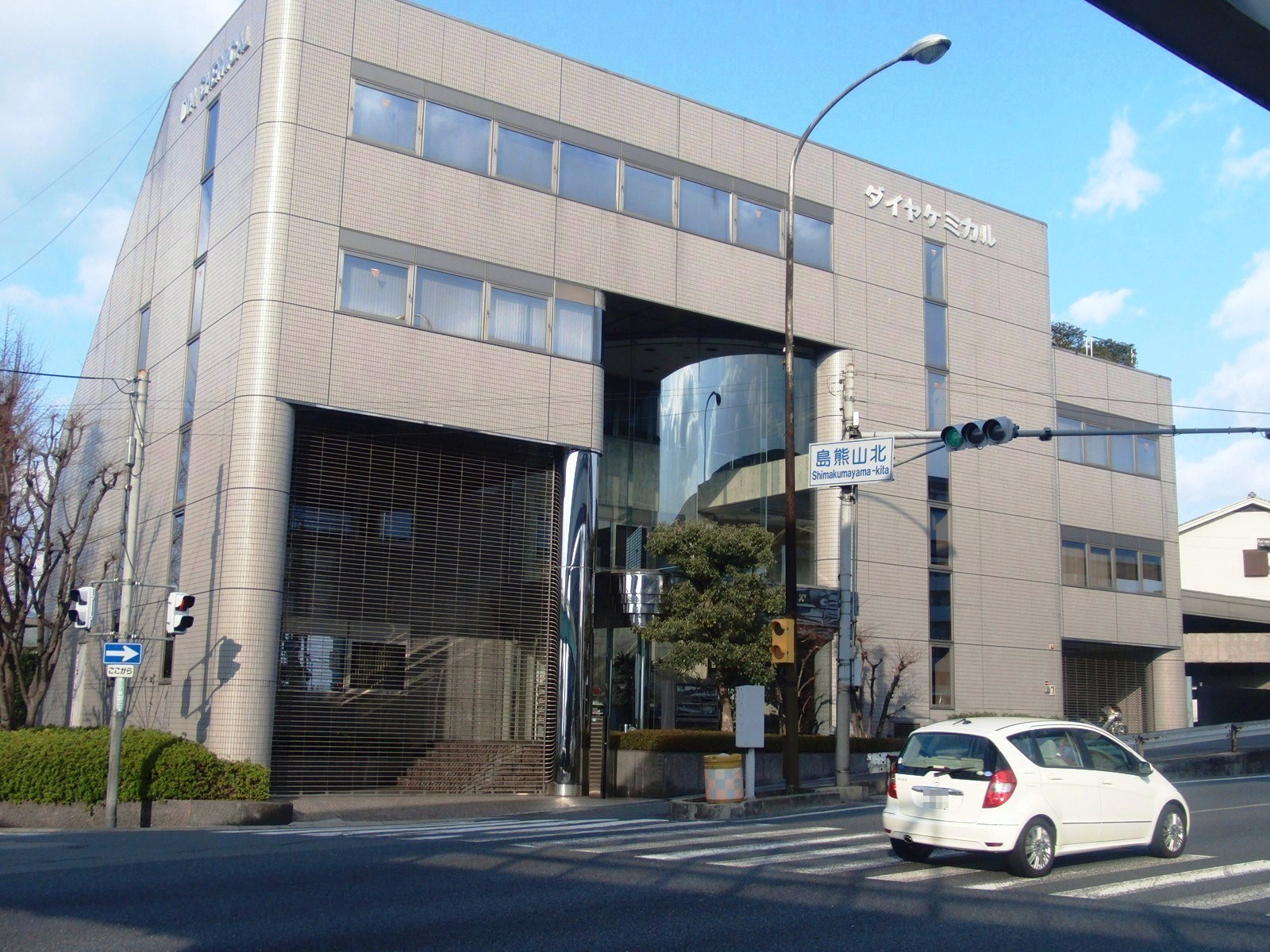 ダイヤケミカル株式会社本社を撮影